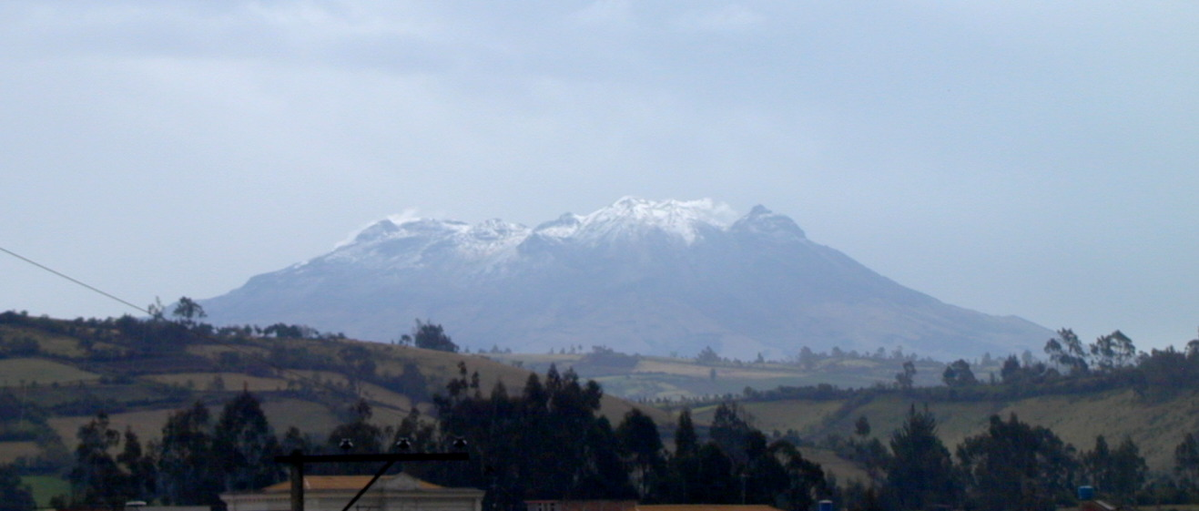 el edificio volcánico de Cumbal visto desde la ciudad de Tulcán en Ecuador.